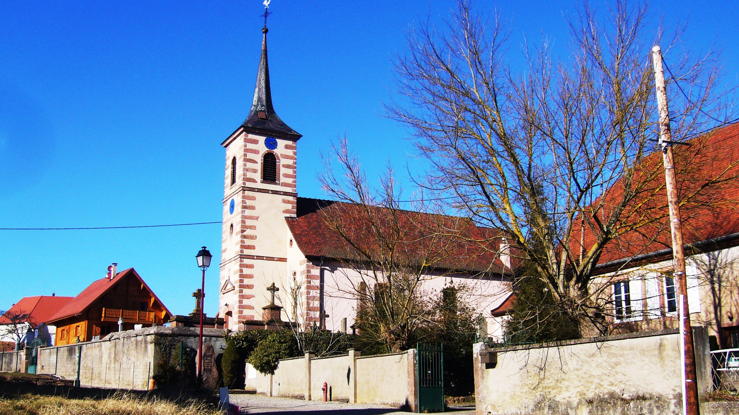 Eglise de Thanvillé